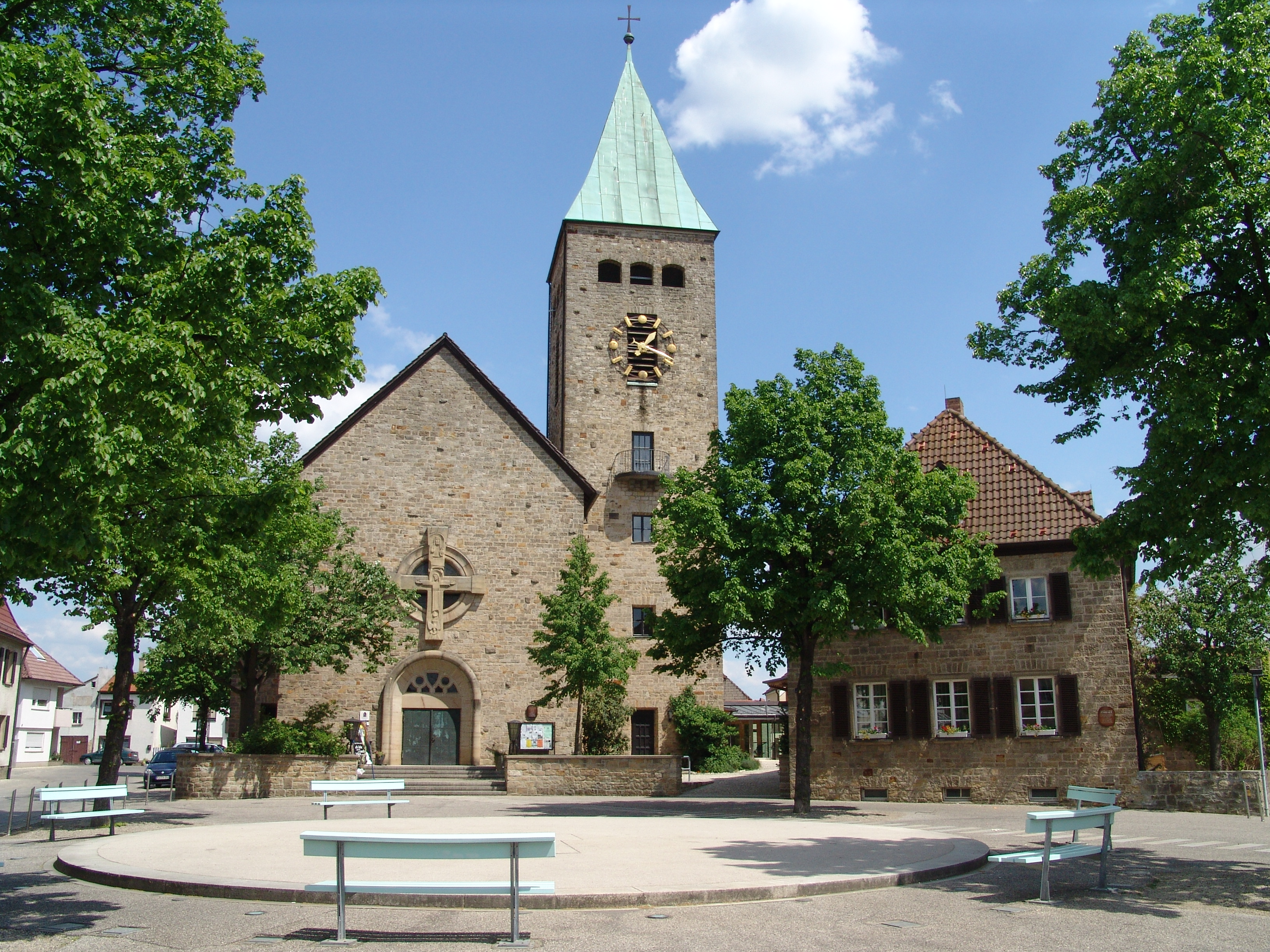 Sennfeld-Plan mit Dreieingkeitskirche